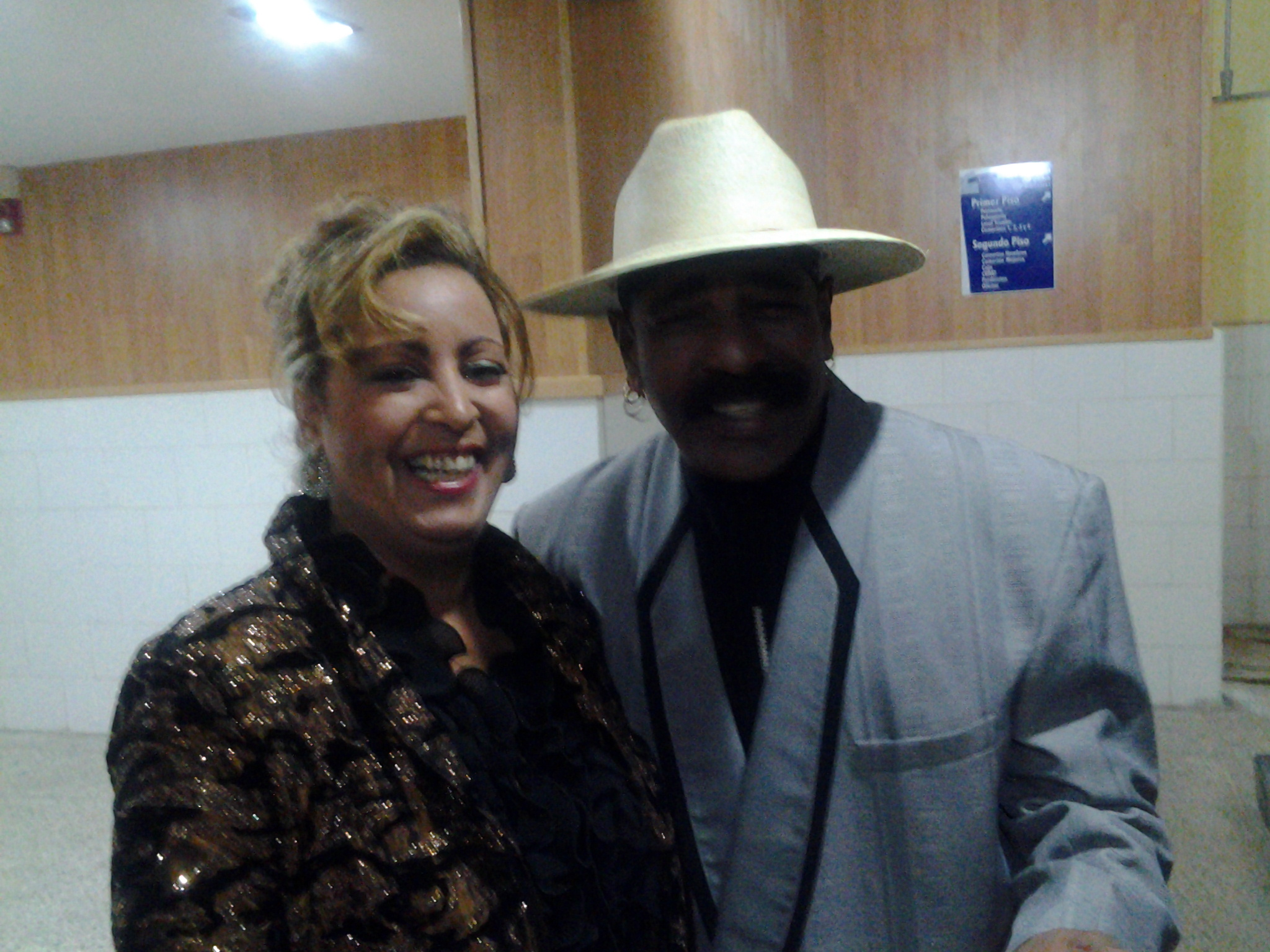 Mariblanca compartiendo escenario con Pedro Calvo uno de los cantantes màs populares e historicos de Cuba